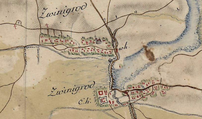 xviii